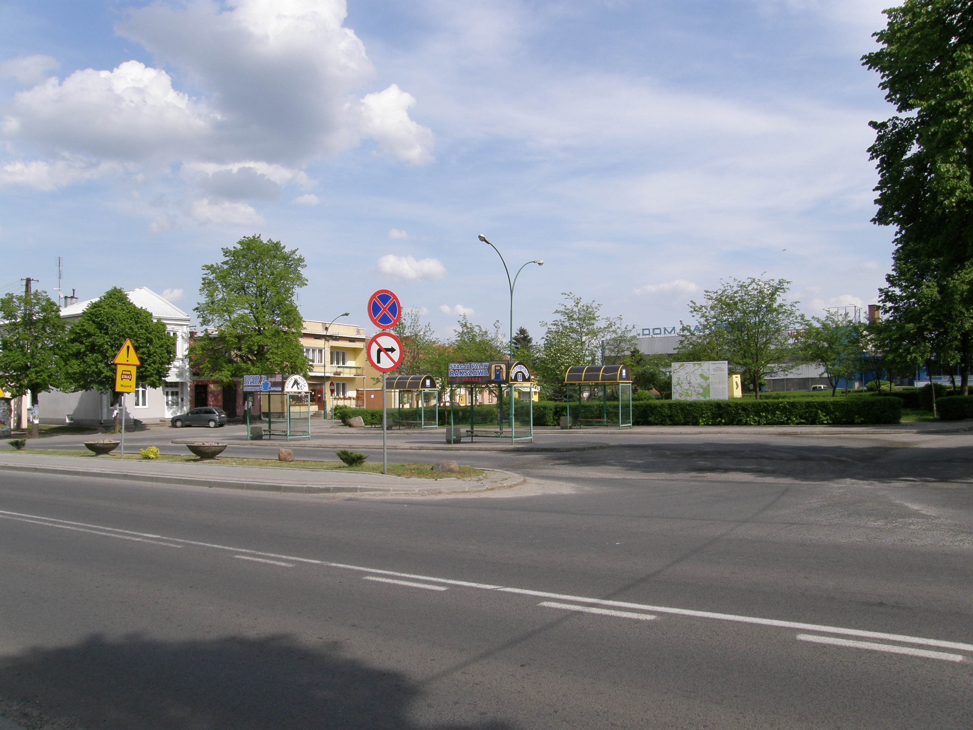 Żołynia - centrum i dworzec autobusowy